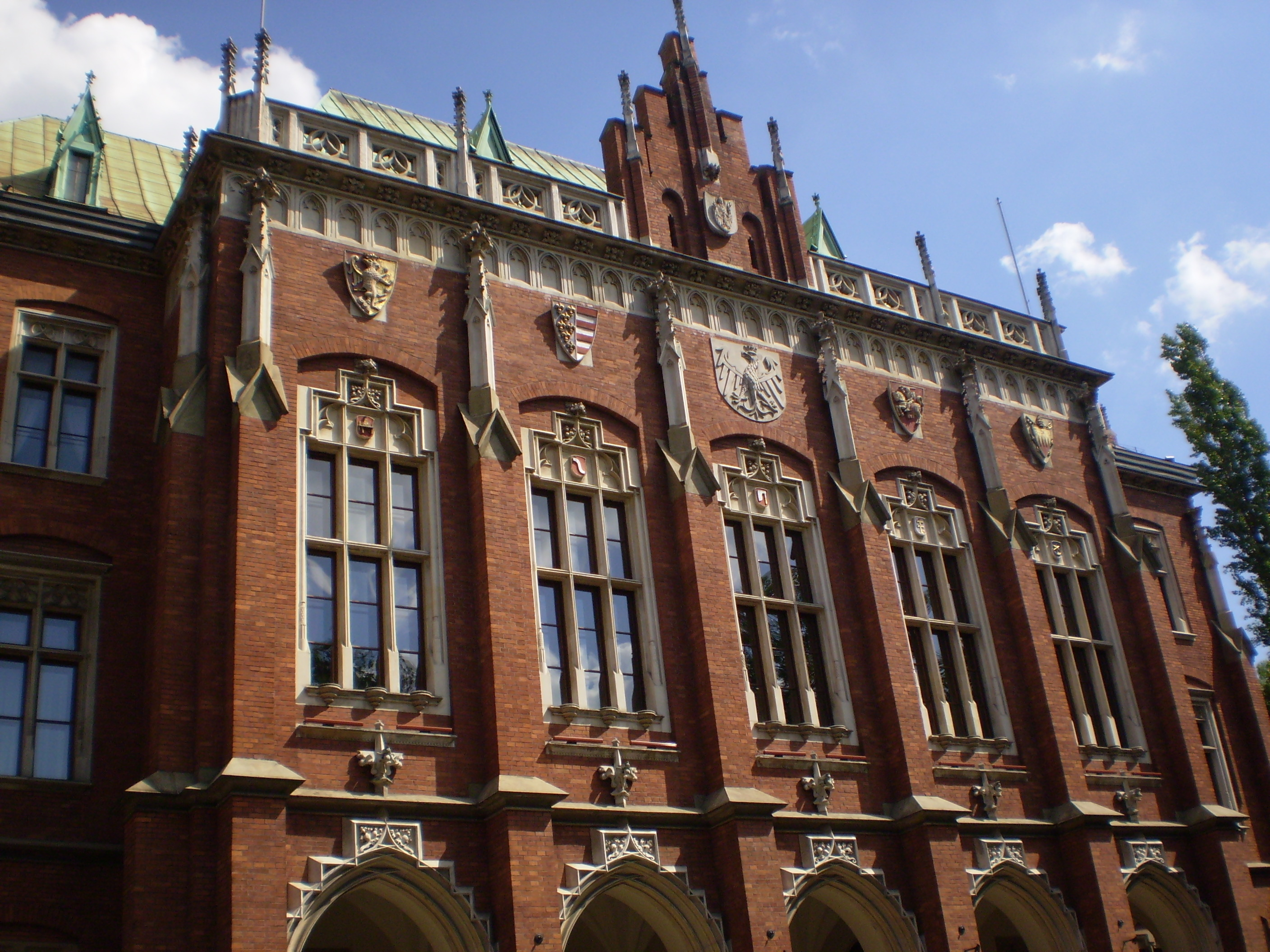 Collegium Novum in Kraków, Poland